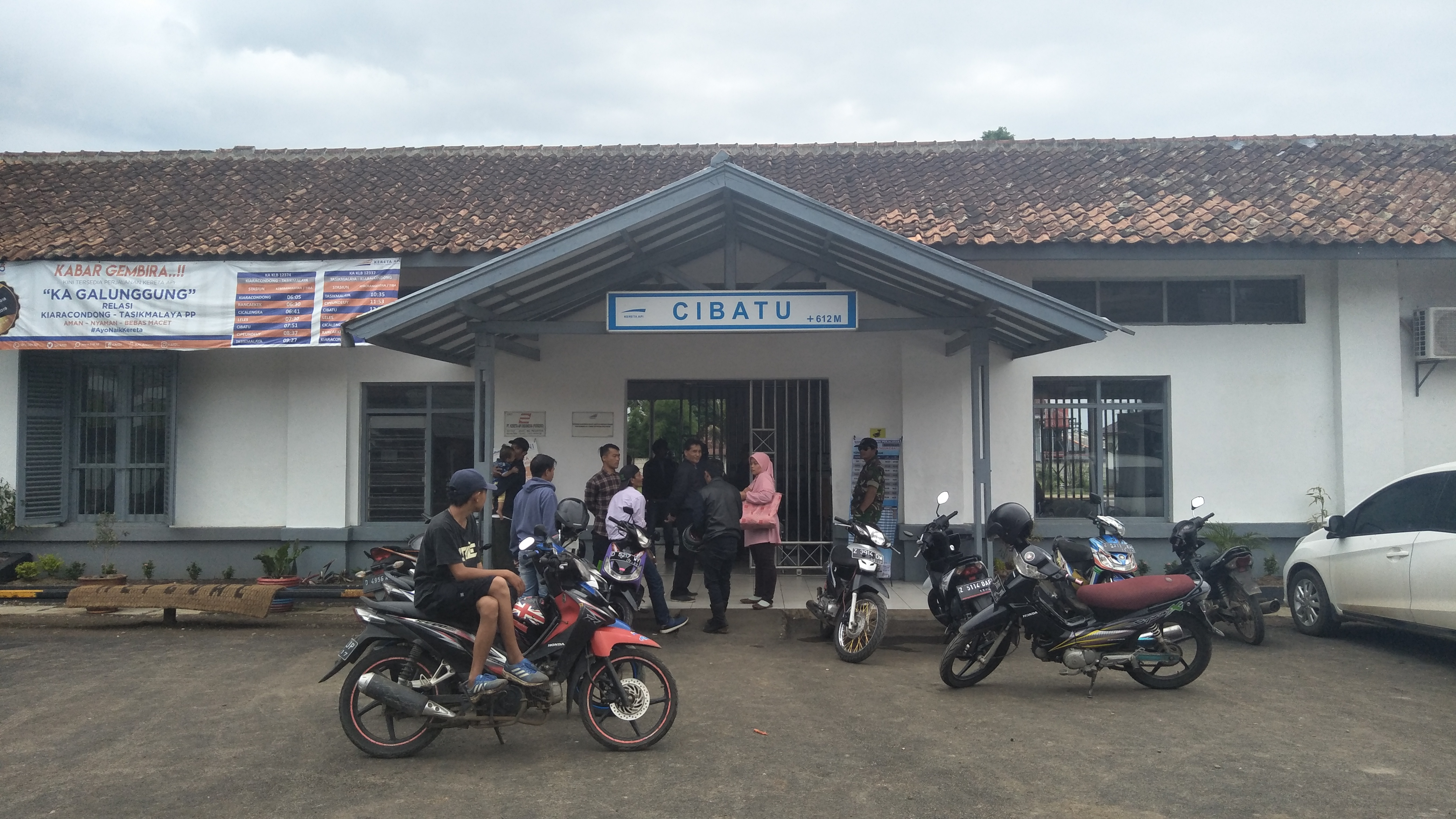 Stasiun Cibatu tampak depan